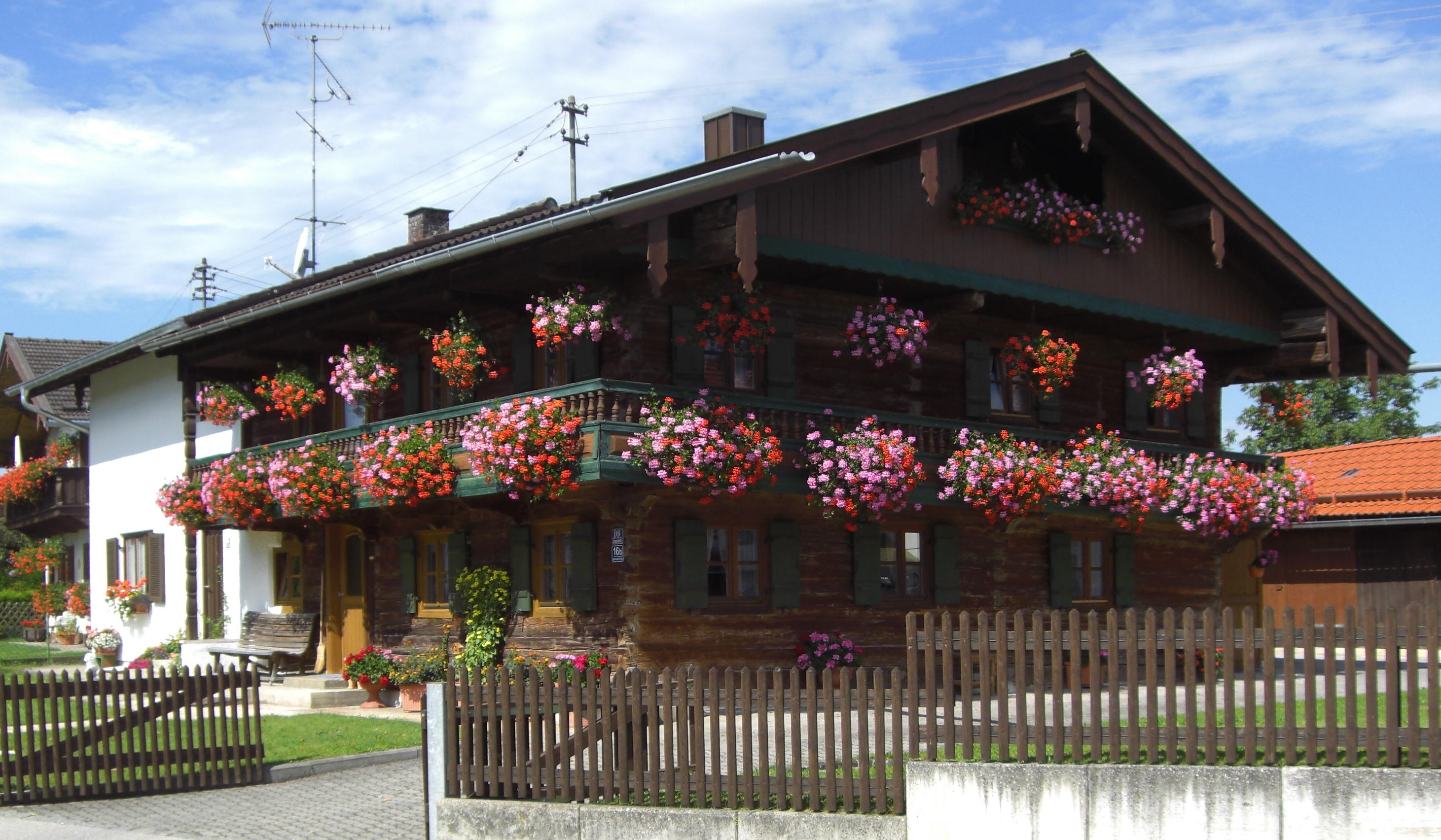 Otterfing, Dietramszeller Str. 16